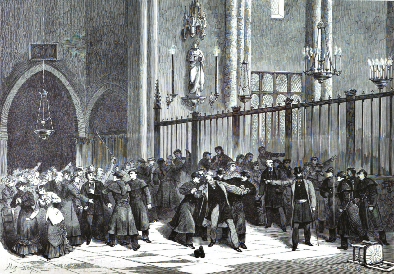 Évacuation de la chapelle du couvent des Capucin, rue de la Santé, novembre 1880, par les gardiens de la paix.